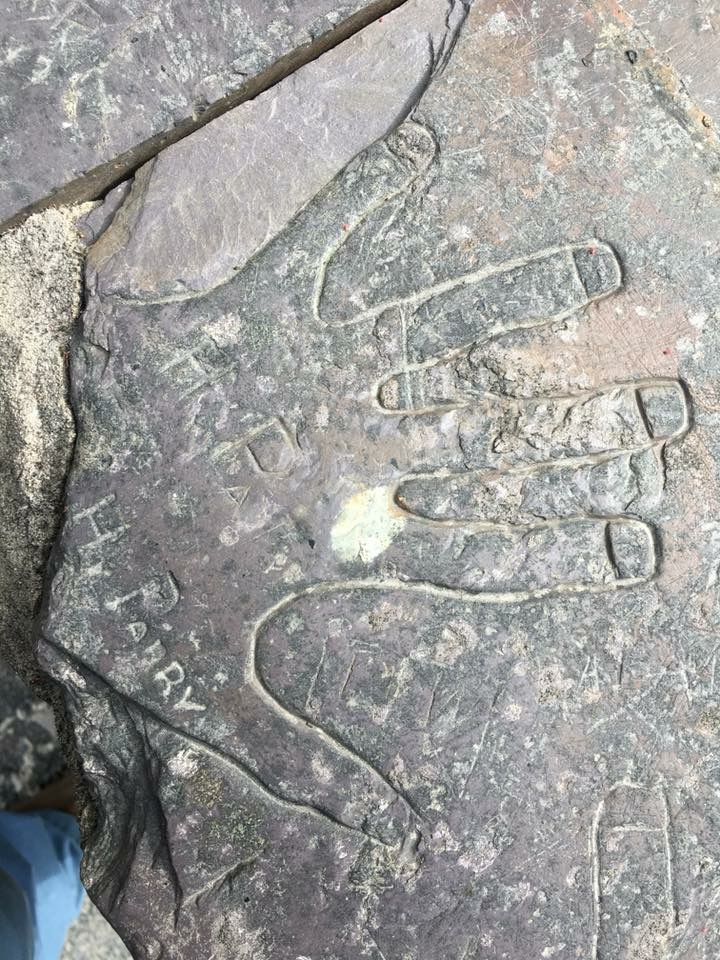 Delwedd o amlinelliad llaw personol cerfiedig ar lechen, Waunfawr, o oes chwareli - y graffito mwyaf cyntefig